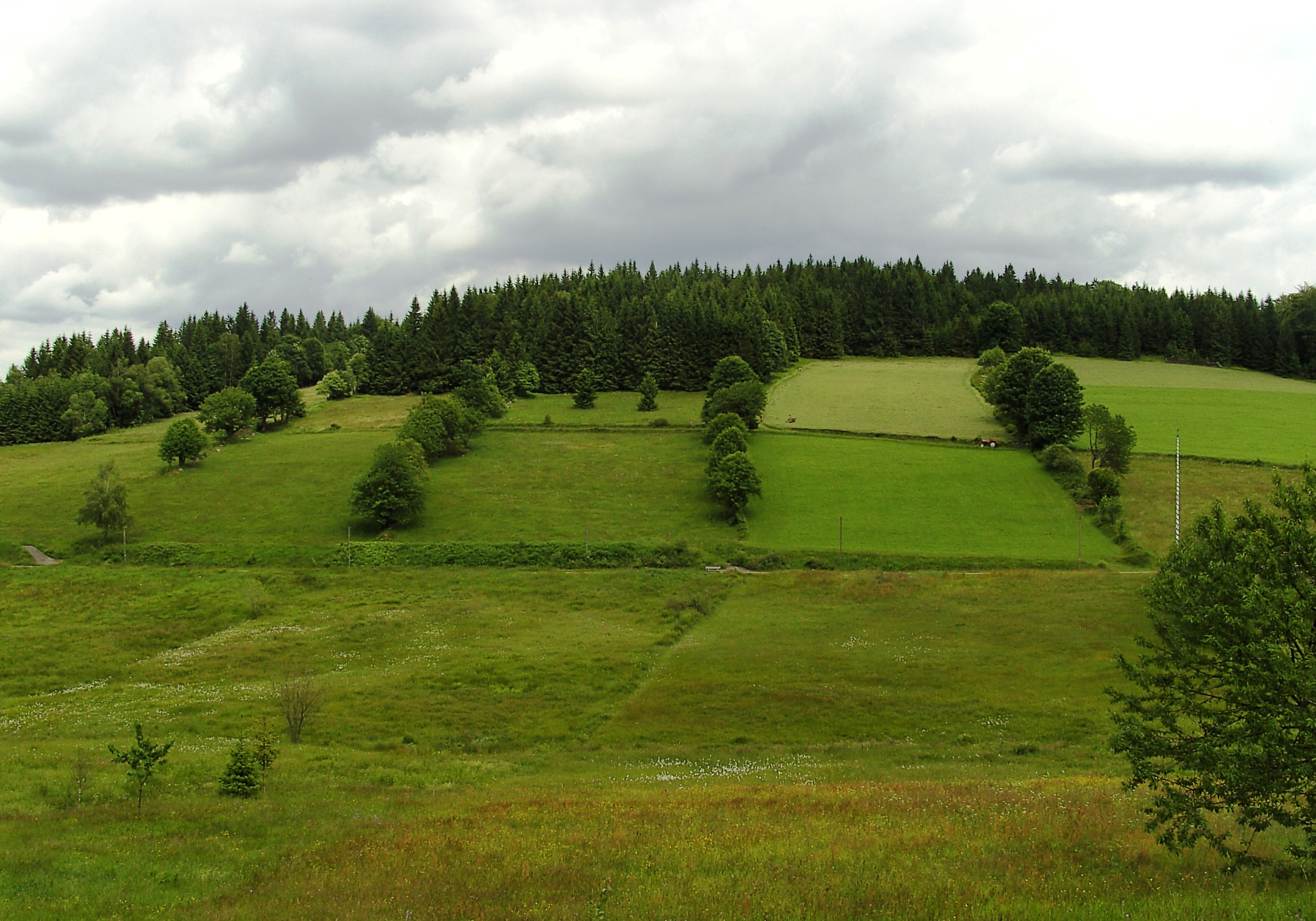 Streifenflur bei Hinterfirmiansreut (Gemeinde Philippsreut) im Bayerischen Wald.